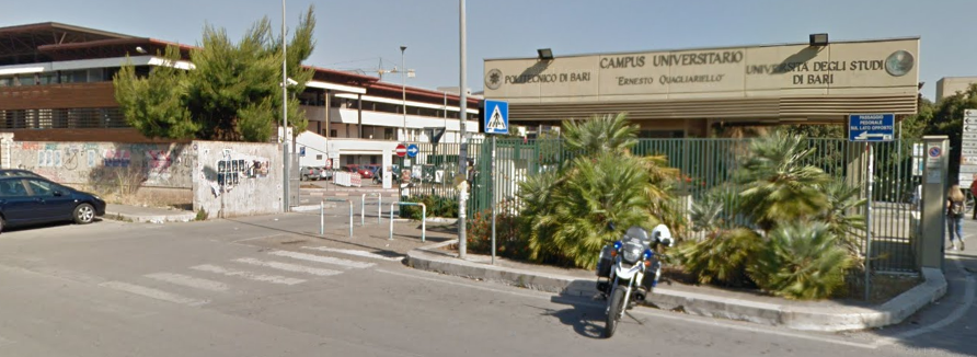 Campus Universitario "Ernesto Quagliariello" - Bari